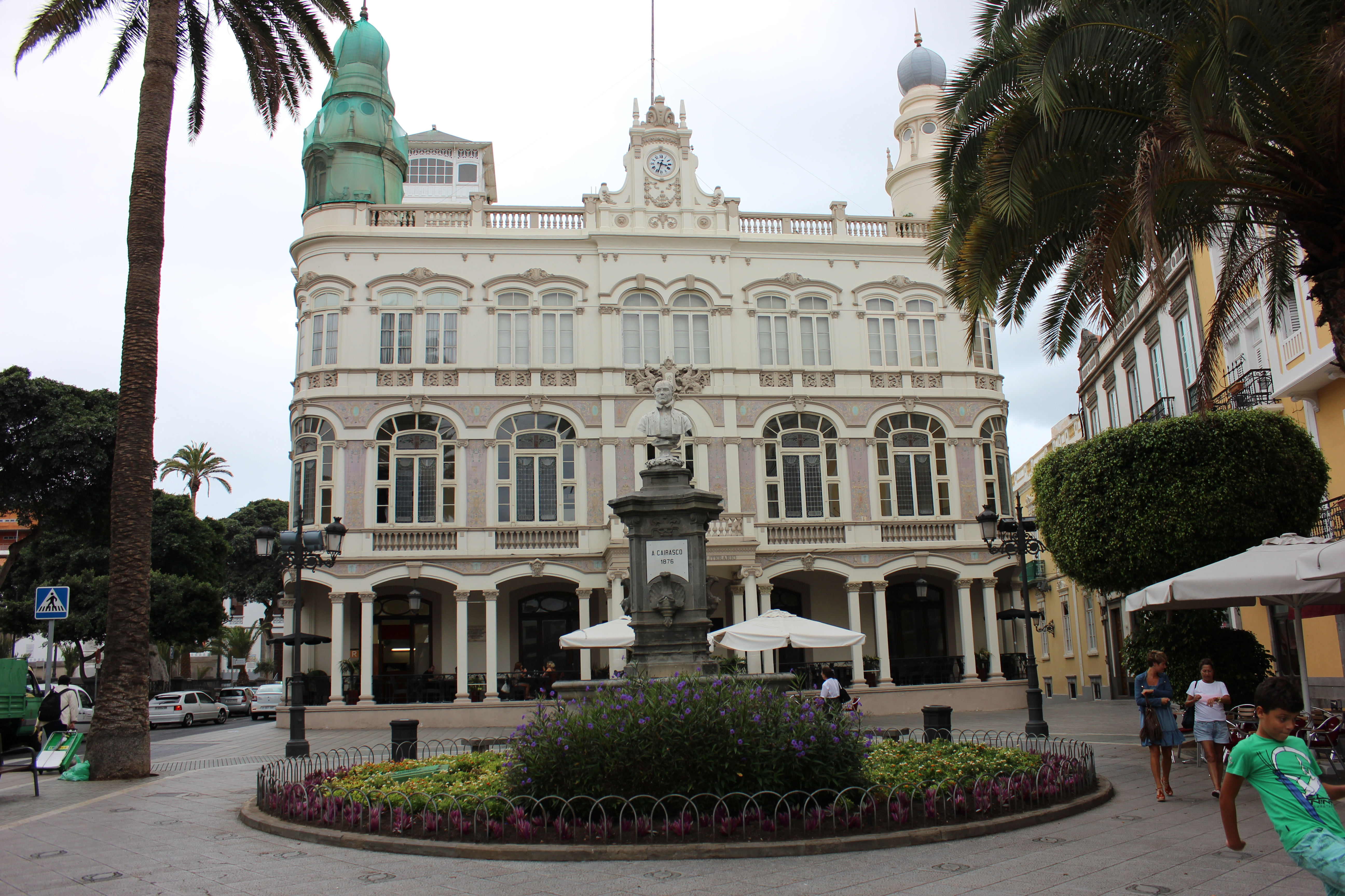 Gabinete Literario de Plaza de Cairasco Numero 1